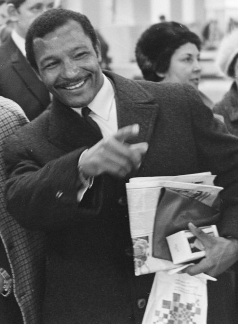 Mario Coluna arriveert op Schiphol voor de halve finale Europacup I tussen Ajax en Benfica